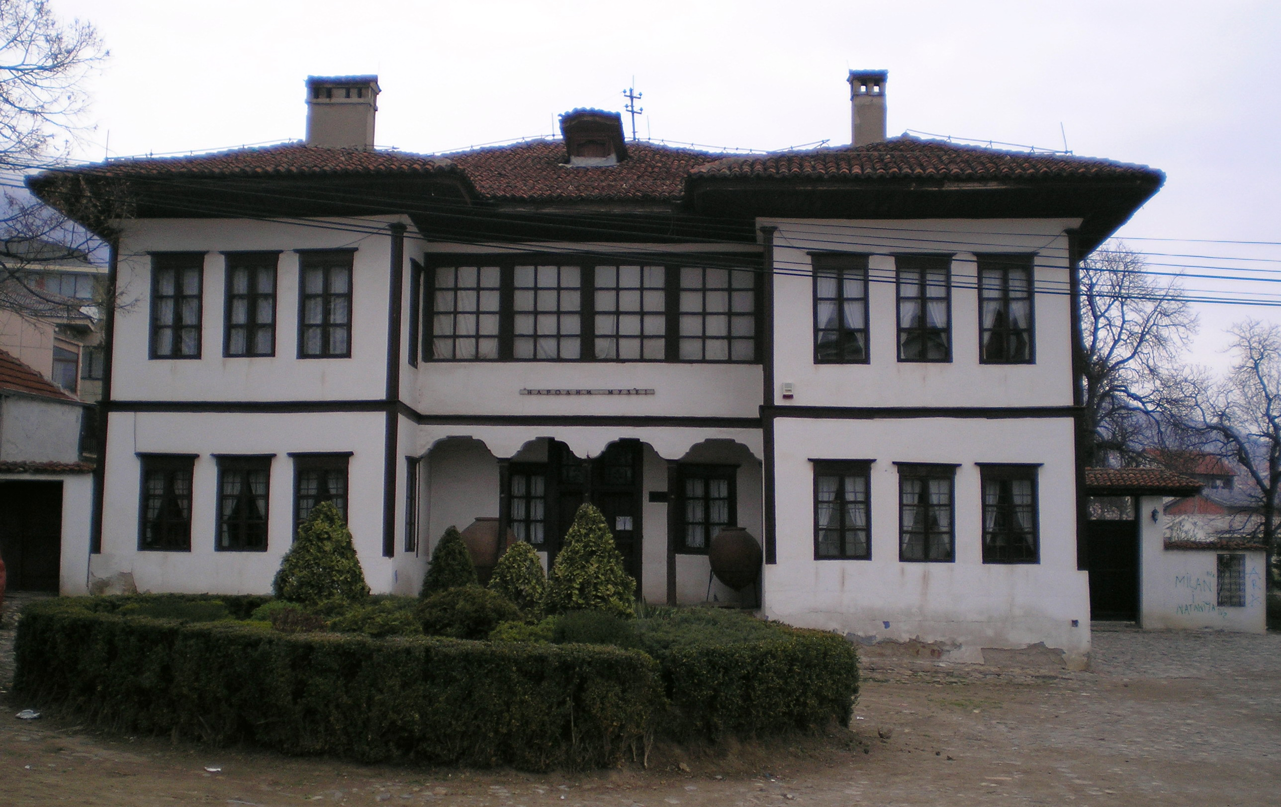 Vranje (National) Museum